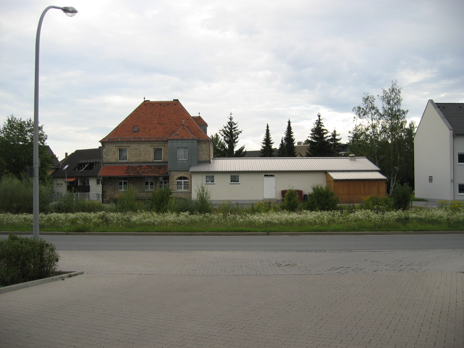 Bahnhof Bayreuth-Altstadt von Süden, über den ehemaligen Gleisbereich. Aufgenommen am 19.8.2006